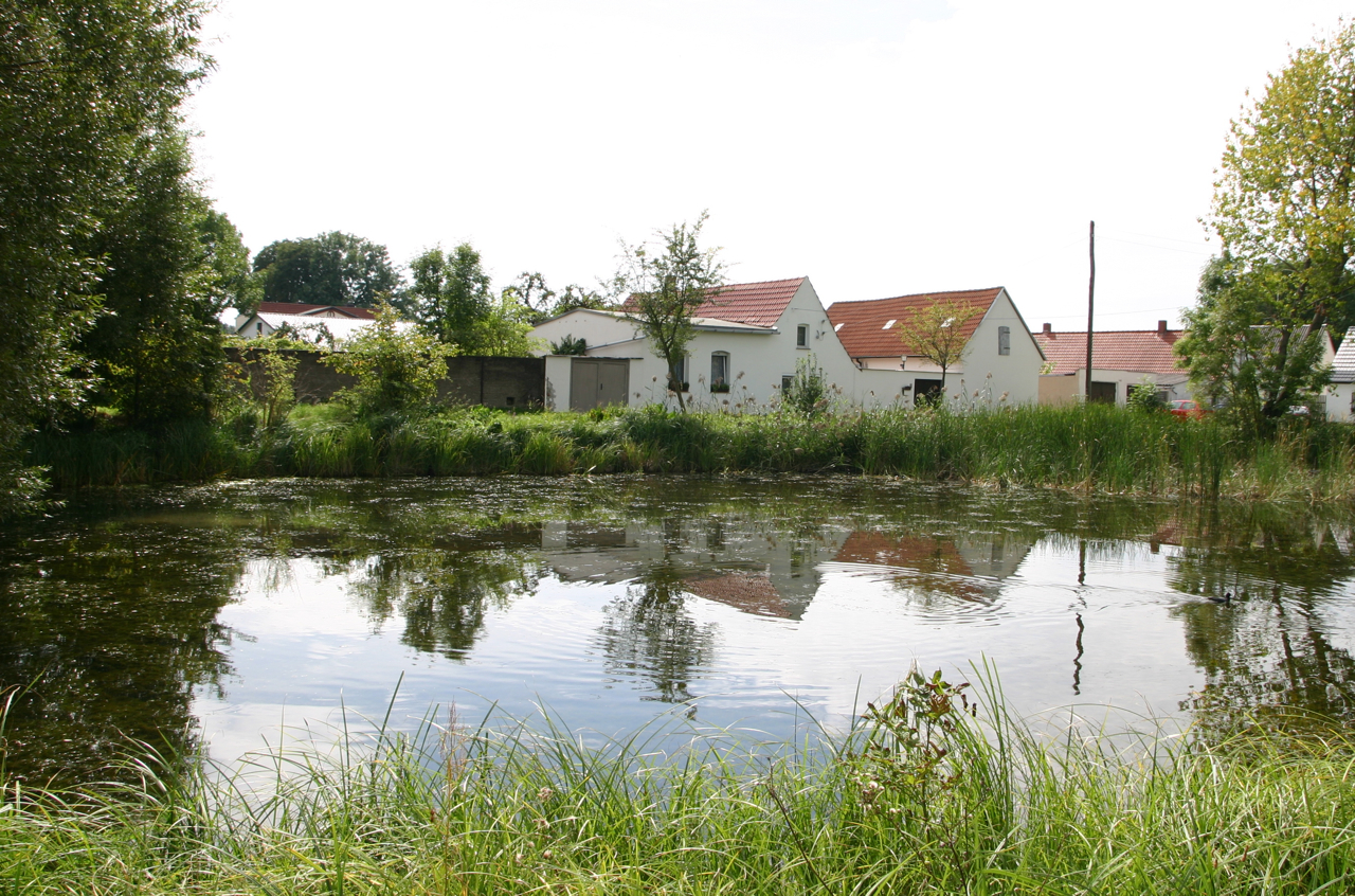 Porst ist ein Stadtteil von Köthen (Anhalt), Sachsen-Anhalt.